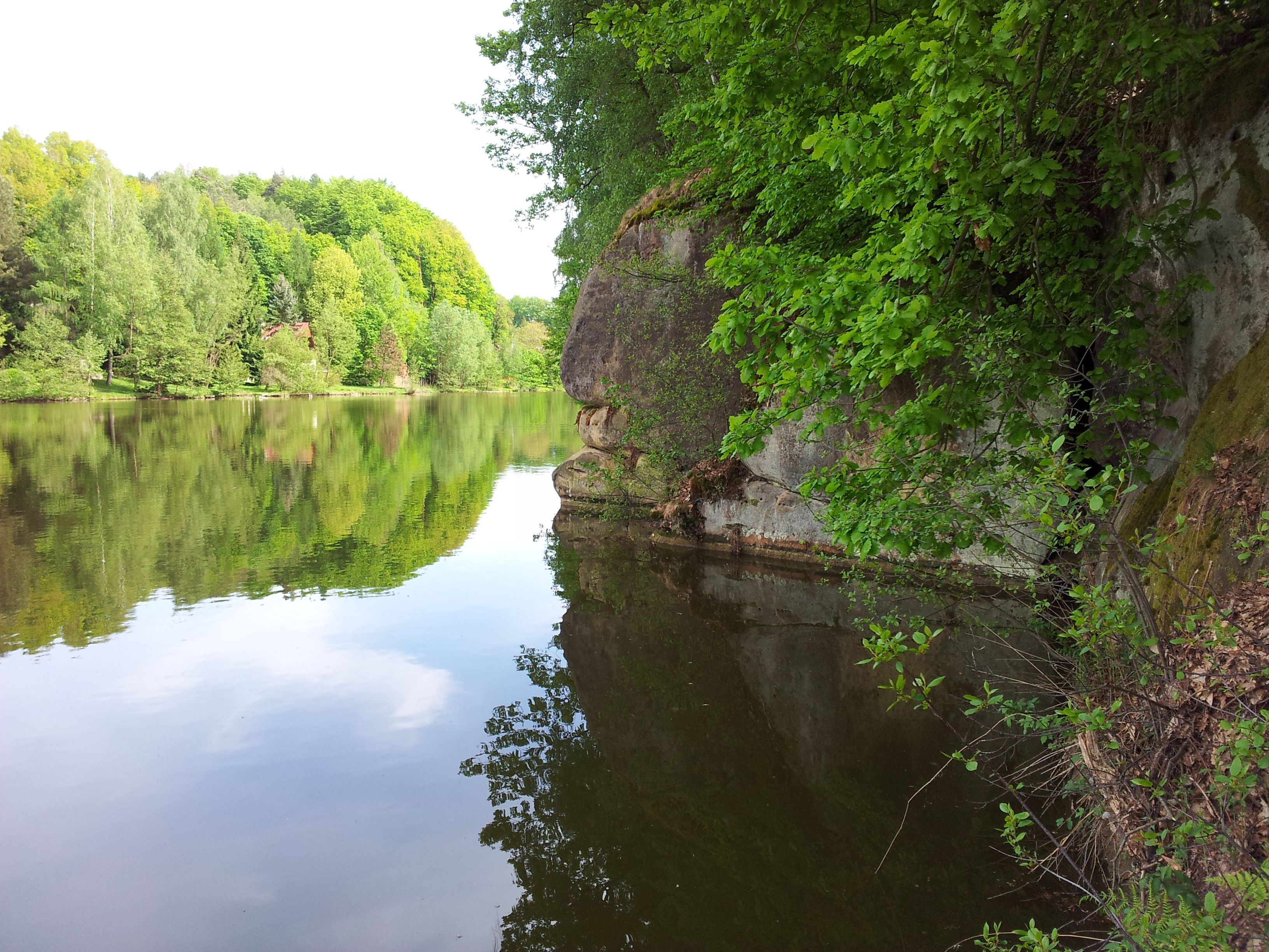 Rybník Roudný, Karlovice